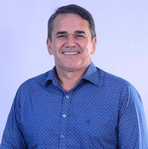 Foto para artigo sobre Cabo Sabino